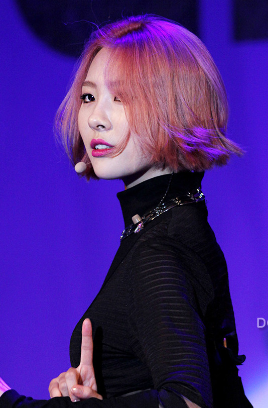 2013년 9월 29일 그린리본마라톤 희망콘서트 에서 선미.